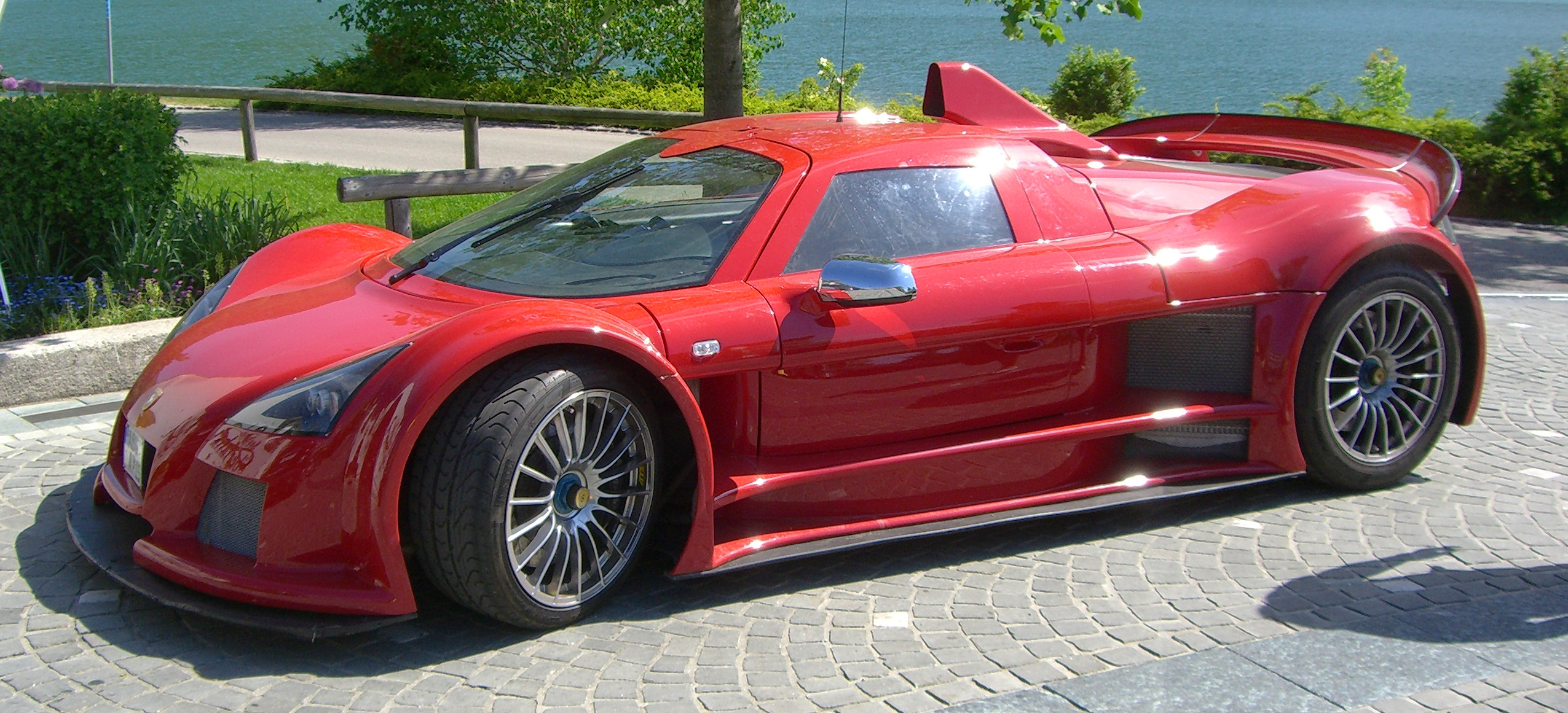 Gumpert Apollo aufgenommen in Rottach-Egern im Mai 2007